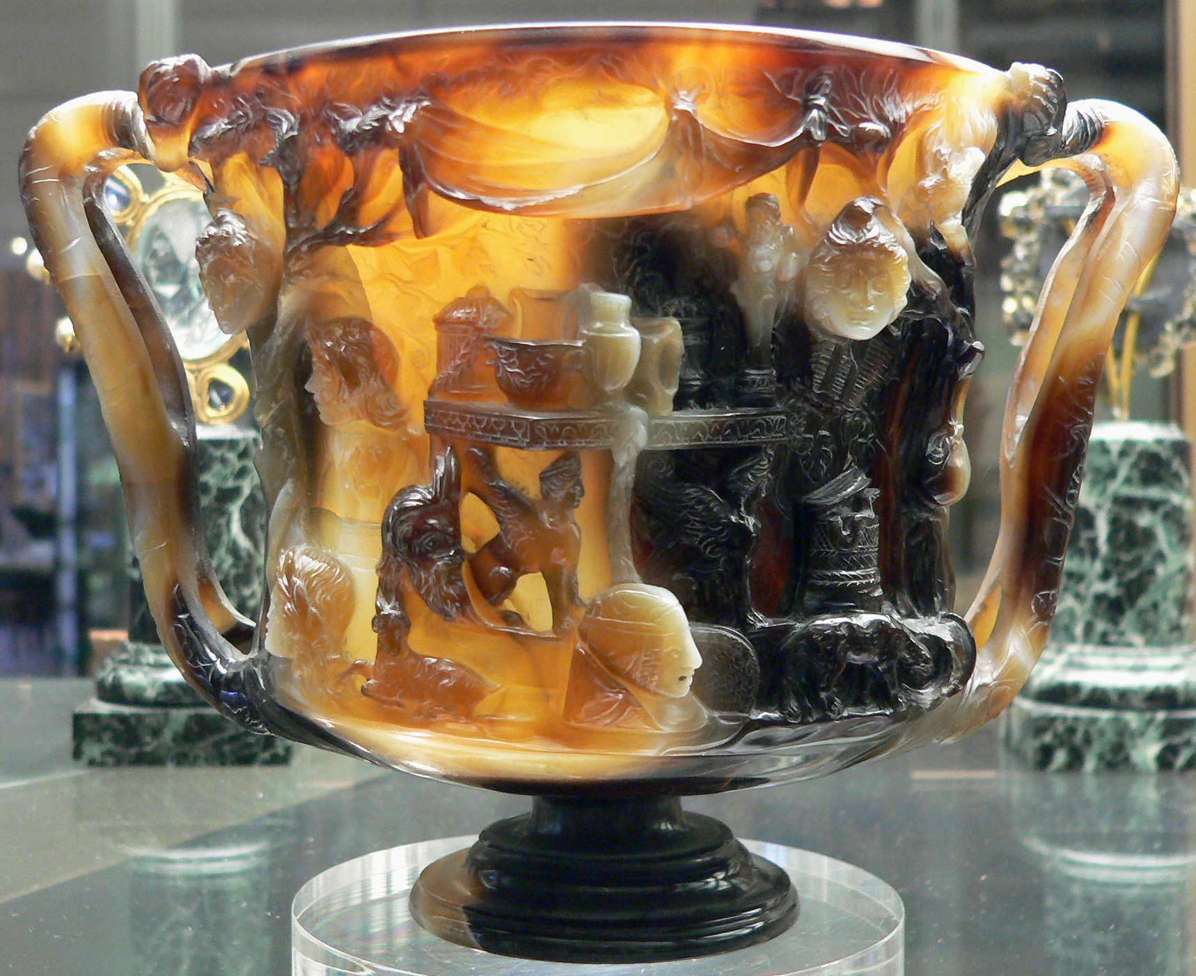 Canthare, dit Coupe des Ptolémées Canthare (1/2), sardonyx, Alexandrie (?), Ie siècle avant ou après J.-C. (?). Scènes de préparatifs d'une cérémonie dionysiaque. Il a appartenu au Trésor de Saint-Denis. Acquis en 1791.